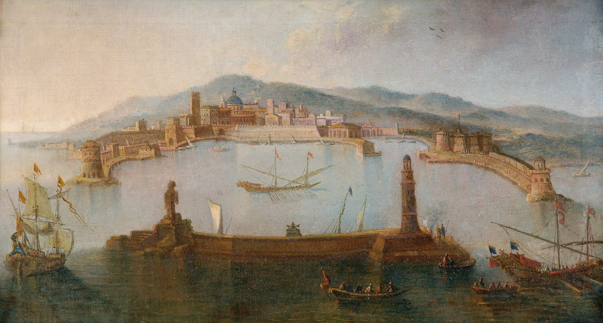 Der Hafen von Civitavecchia. Öl auf Leinwand, 30 x 56 cm. Italien 17./18. Jhdt.